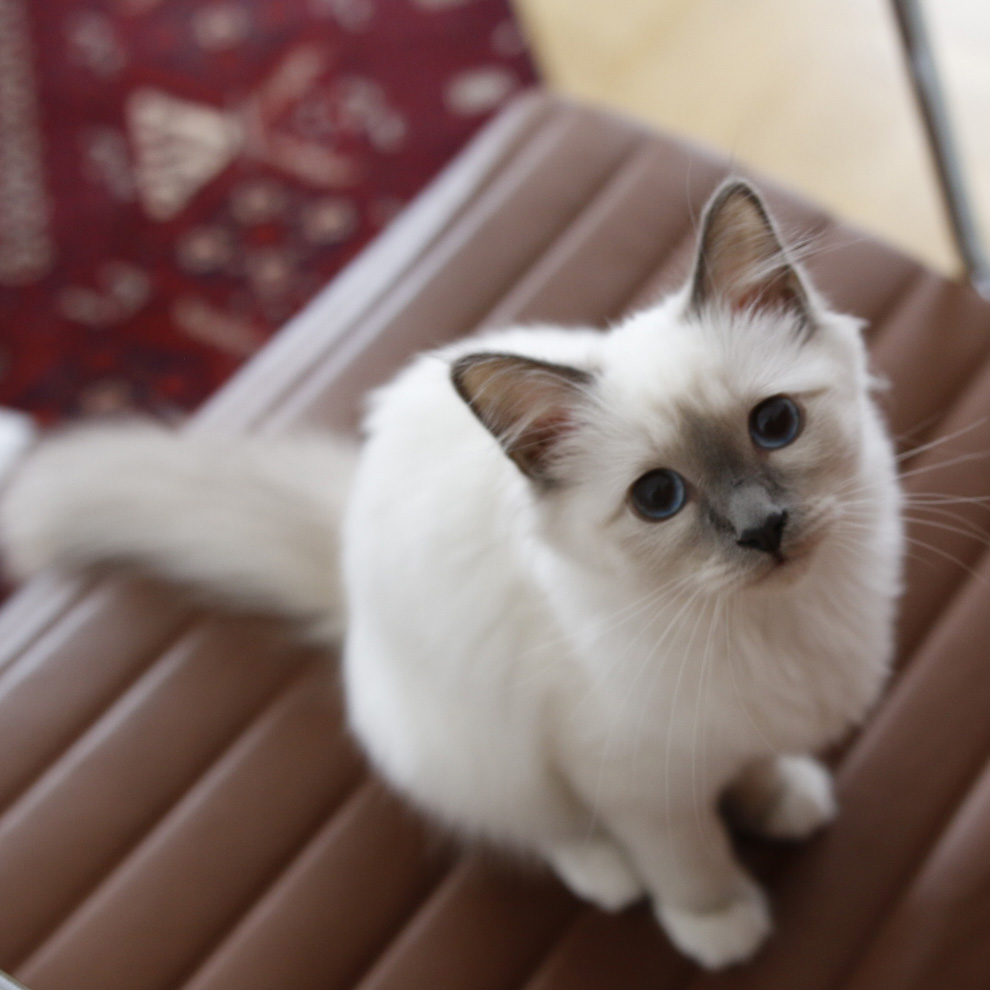 Helig Birma kattunge 6 månader